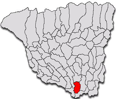 Categorie:Hărţi ale judeţului Gorj